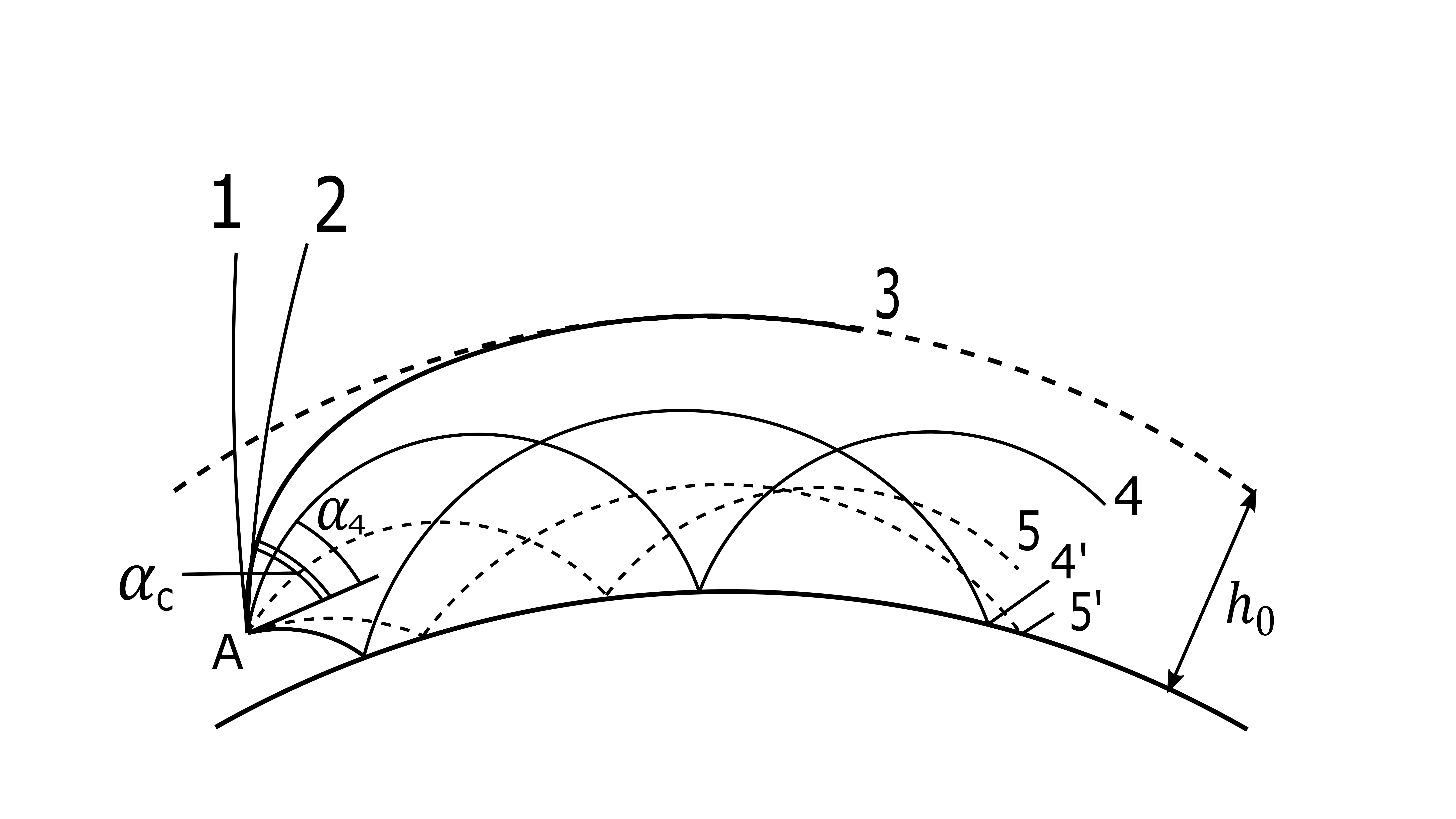 Super-Refraccion